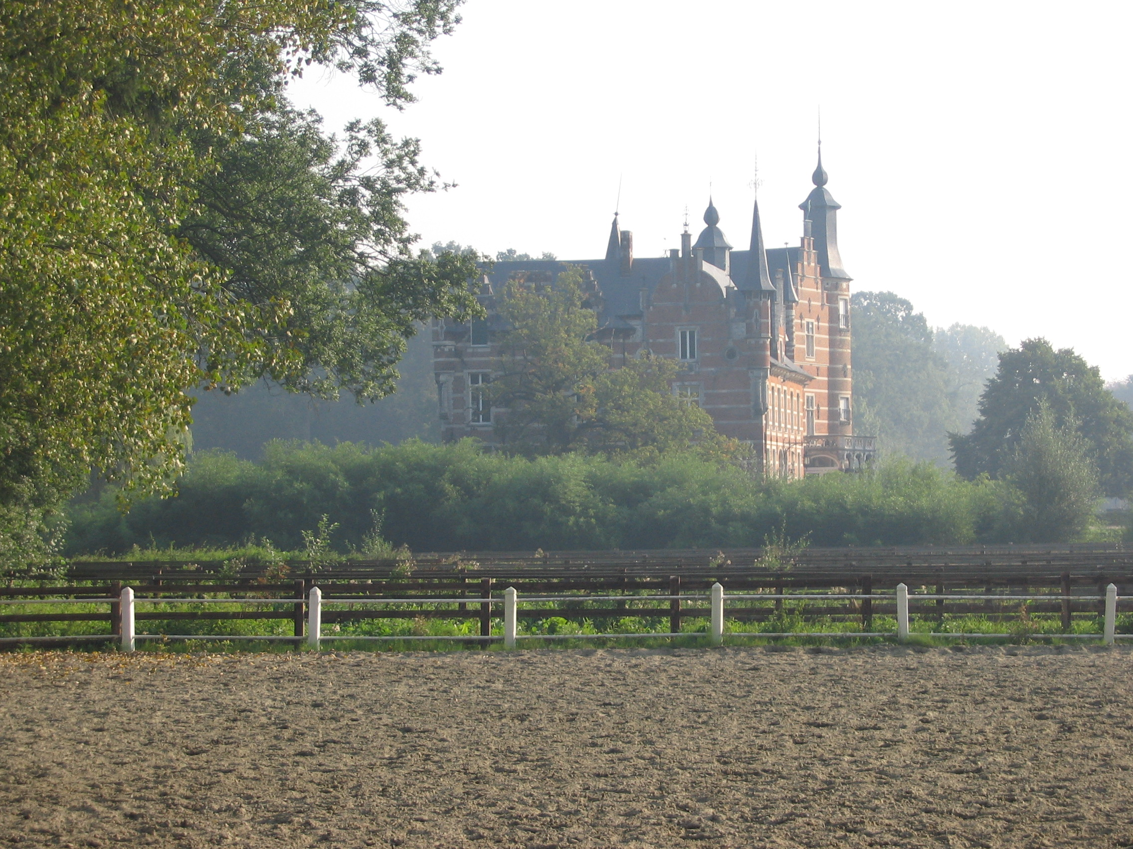 Gravenkasteel te Humbeek - eigen foto - september 2006